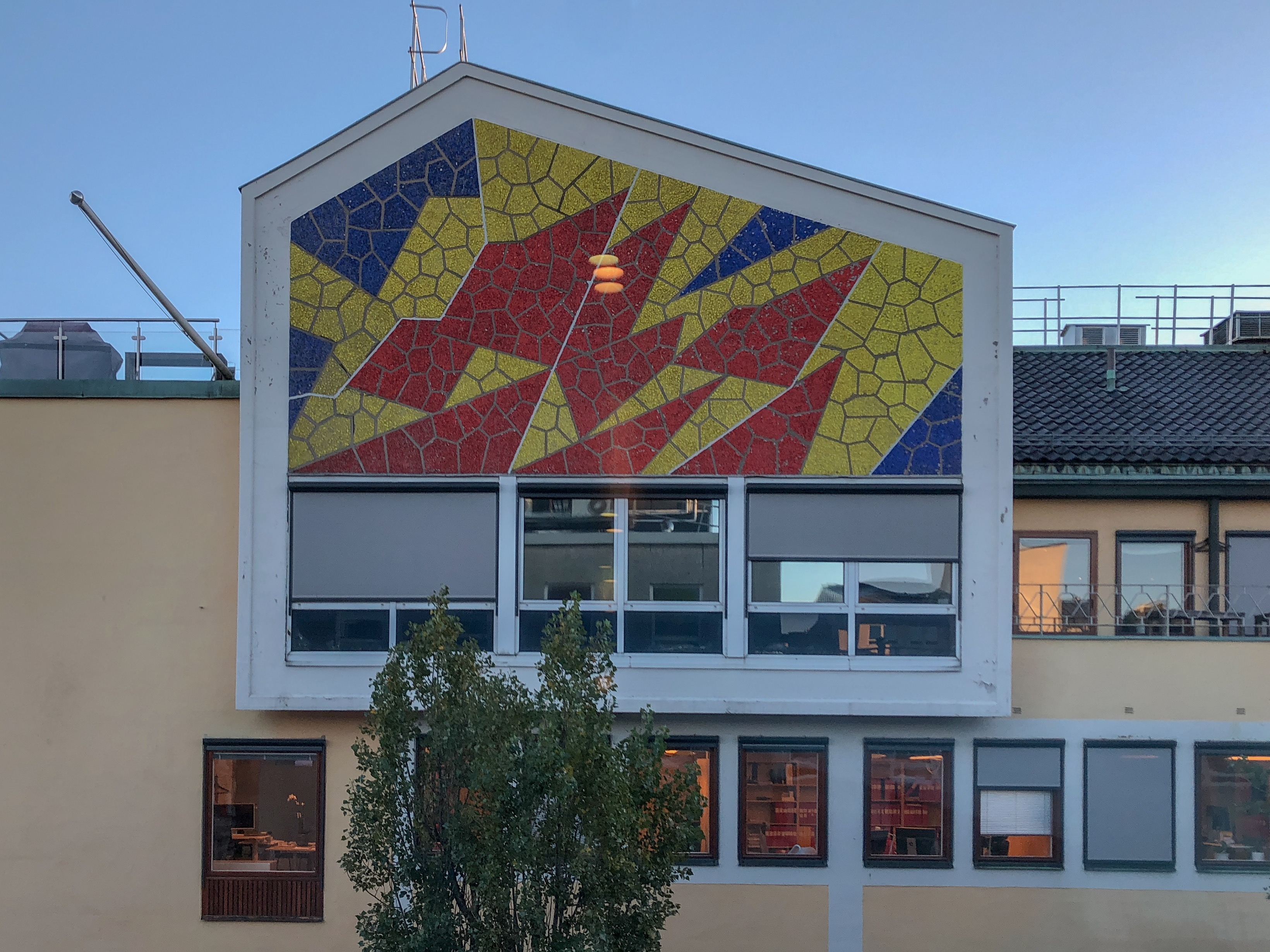 Törnet 10, Luntmakargatan 46, Tegnérgatan 21 Byggnadsår 1954-57, arkitekt Björn Hedvall, byggherre Livförsäkringsanstalten Folket - Ömsesidig (Folksam). Byggmästare Byggnads AB Projector. Mosaik av Nils Tydén